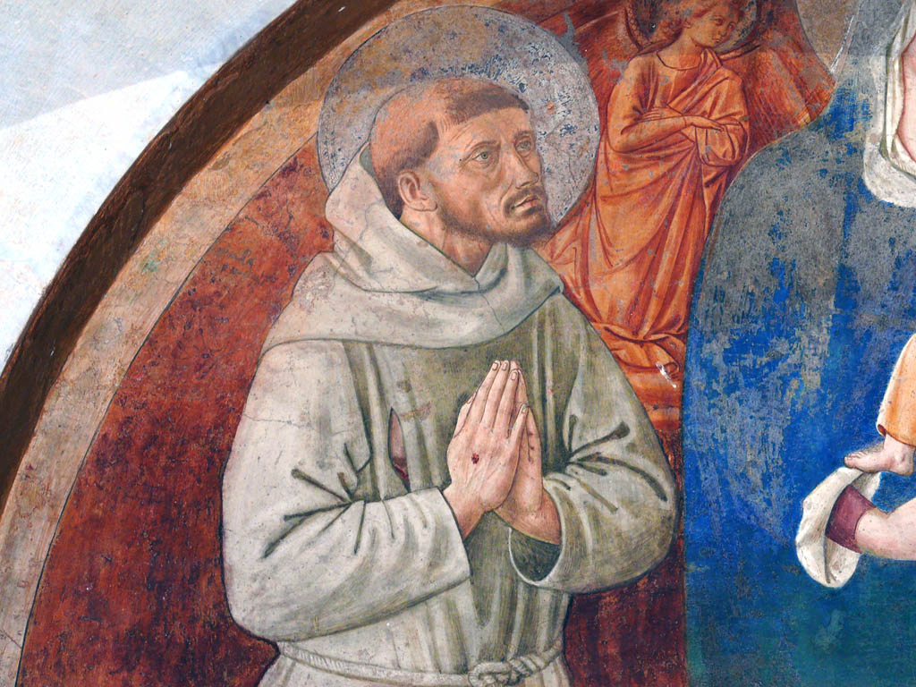 Montefalco: Convento di S. Fortunato, fresco - detail